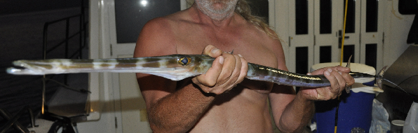 Fistularia petimba, a 200 km al noroeste de Darwin, Australia